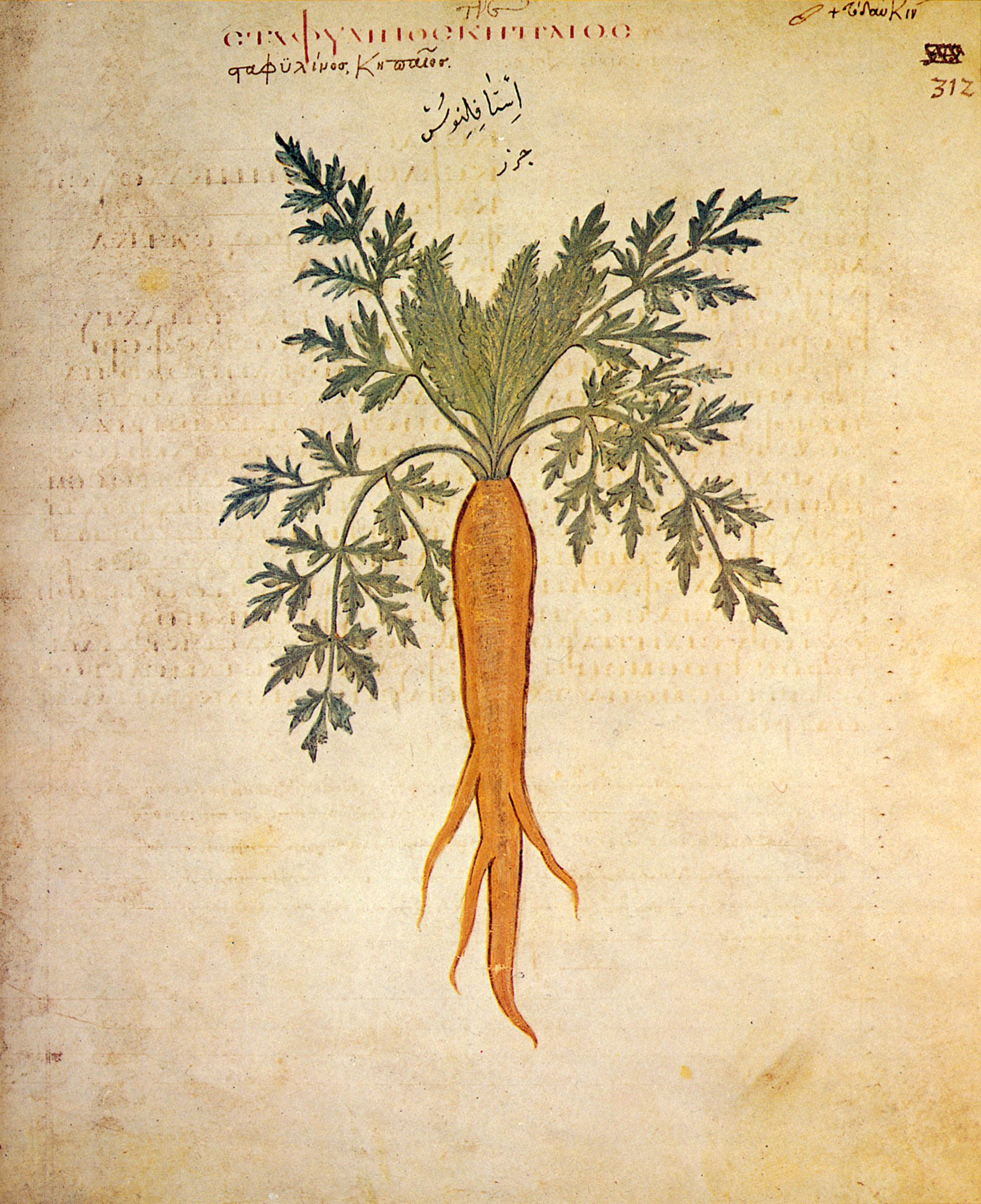 Pflanzenbild der Gemeinen Möhre (gelben Rübe, Karotte), (Daucus Carota L., Fam. Umbelliferae) im Wiener Dioskurides, Blatt 312 recto